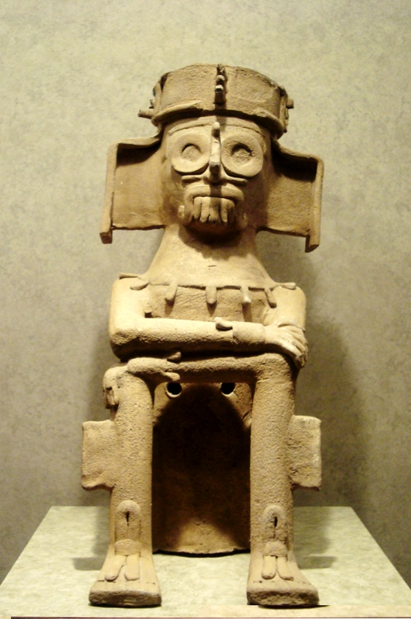 Escultura de Dzahui, dios mixteco de la lluvia. Realizada en cerámica. Cultura mixteca, período Posclásico, procede del estado de Oaxaca. Colección de Museo Nacional de Antropología (México).